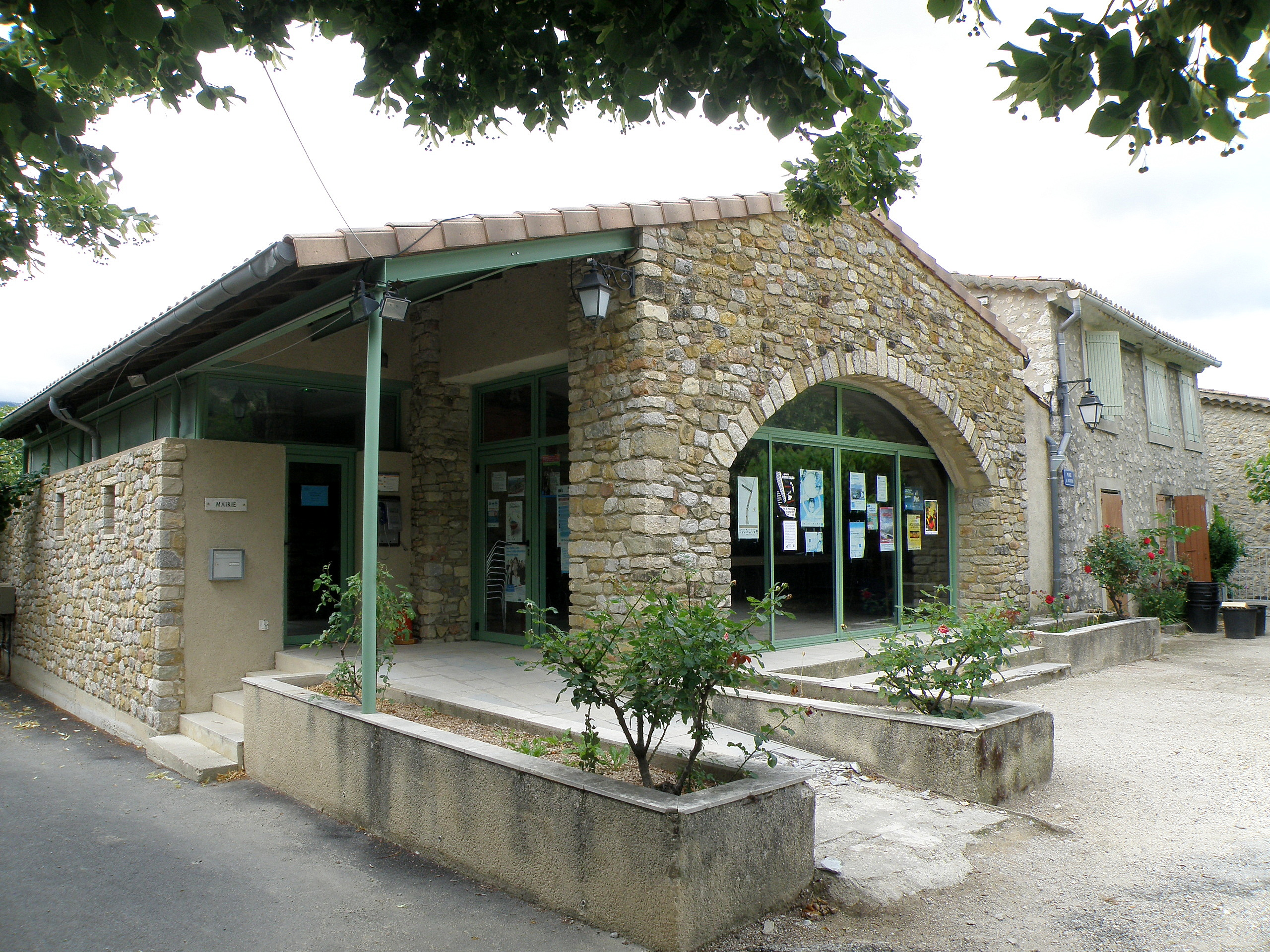 Plaisians (Drôme, France). Mairie, place de Verdun, dans le bourg-centre.